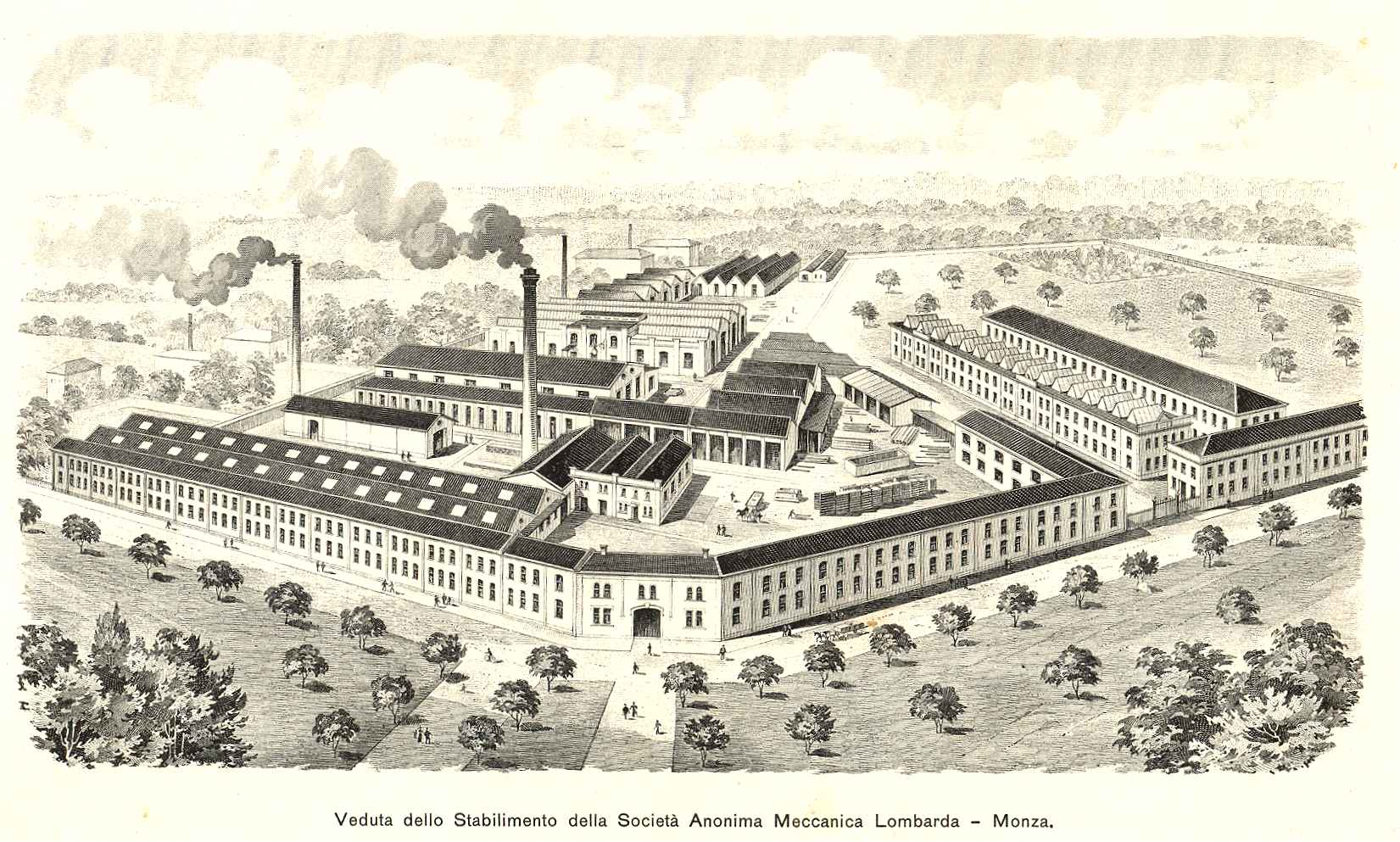 Veduta dello stabilimento di Monza della Società Anonima Meccanica Lombarda ex Ditta Alfredo Zopfi - 1895 progetto arch. Guglielmo Canesi messa in opera capomastri fratelli Gaetano e Eginio Casanova